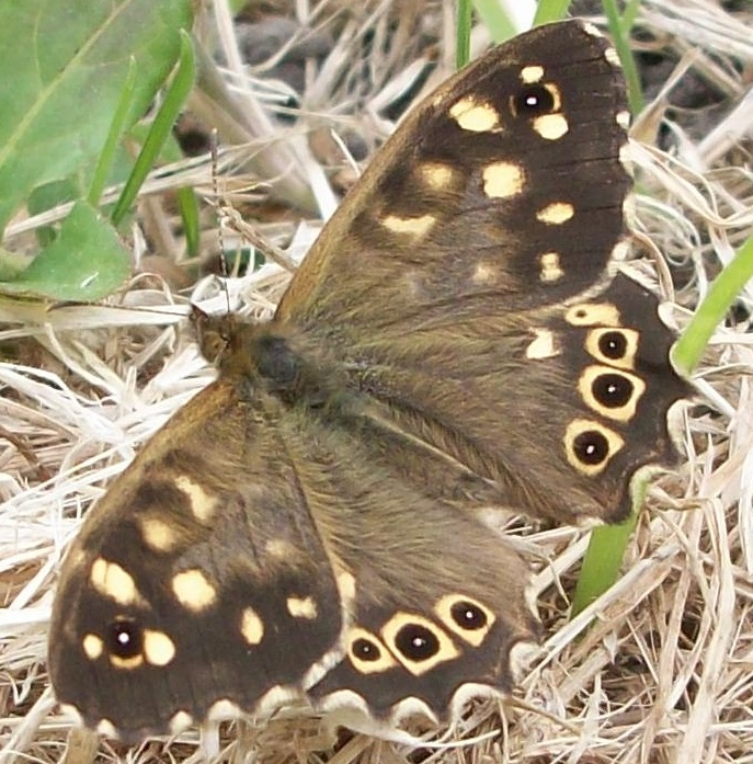 papillon Tircis, Pararge aegeria photo du 05 06 2016 lieux 59210 france